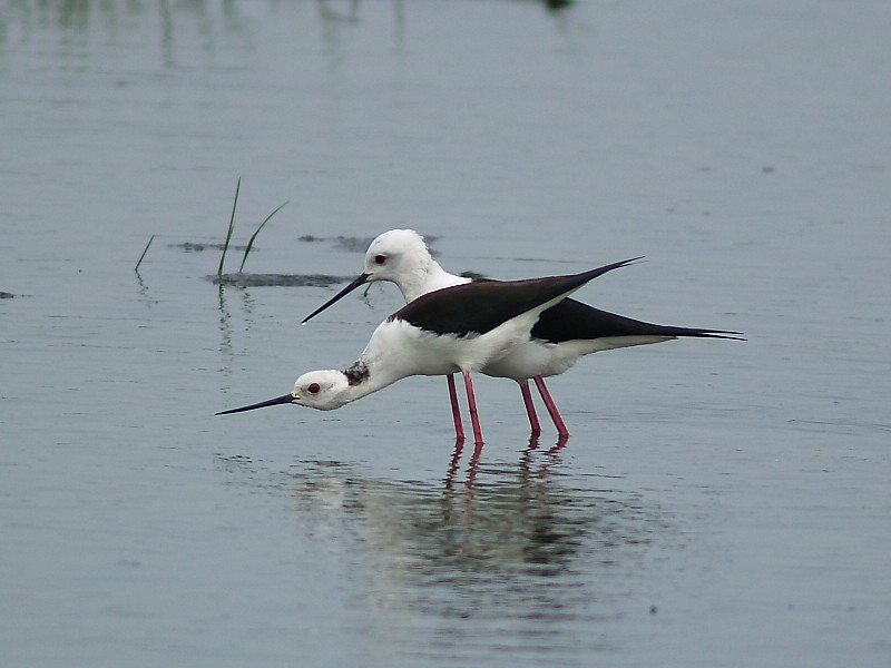 Himantopus himantopus（高蹺鴴）, Changhua County, Taiwan, 2007.